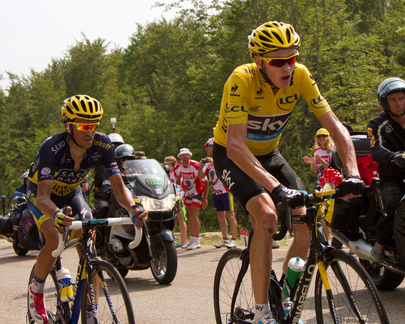 025 froome en contador